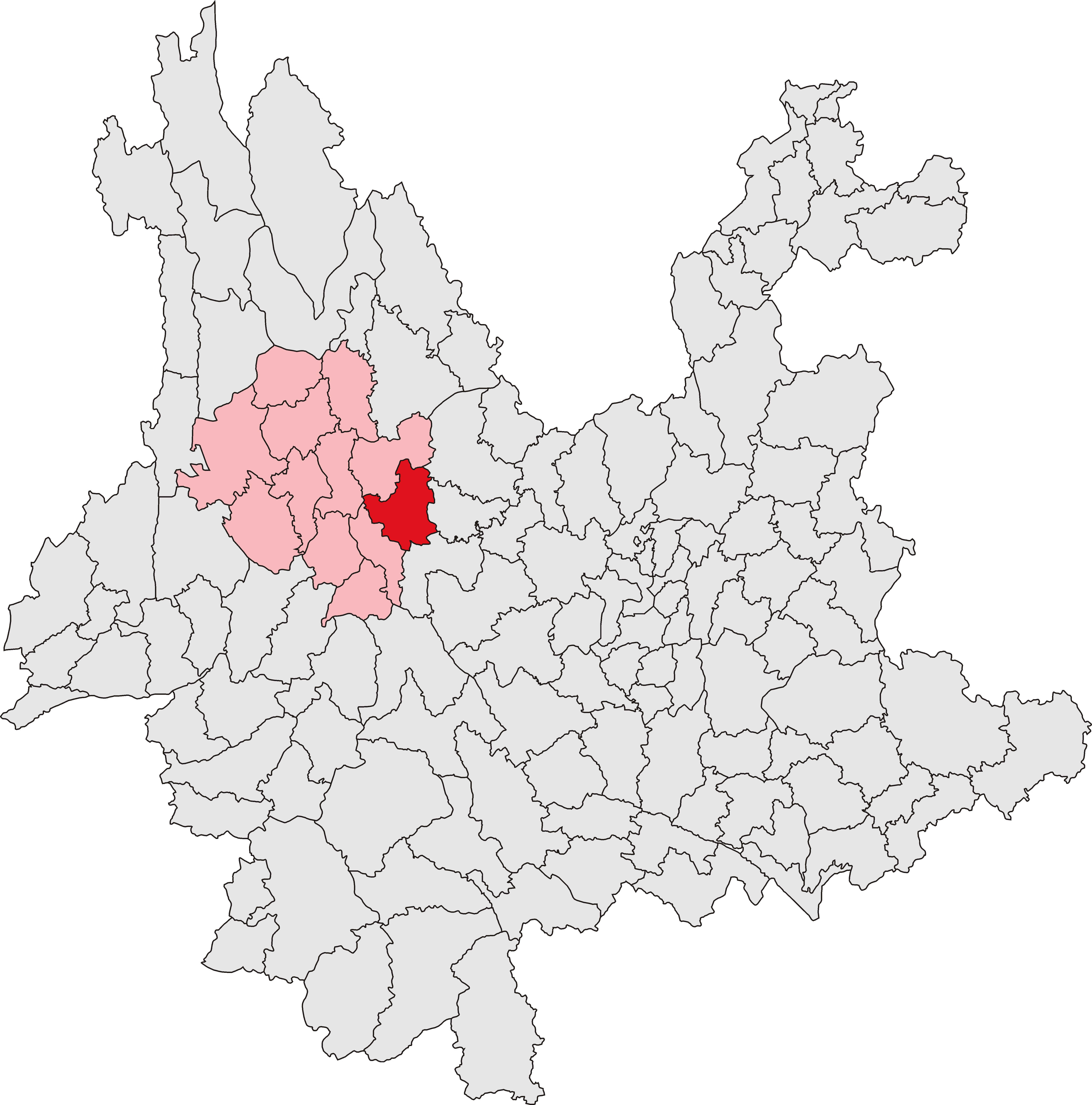 中文（中国大陆）: 祥云县位置图